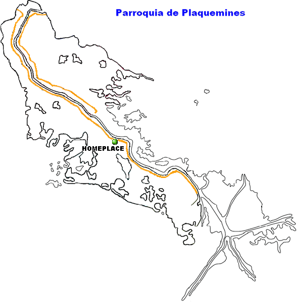 Homeplace, Louisiana.